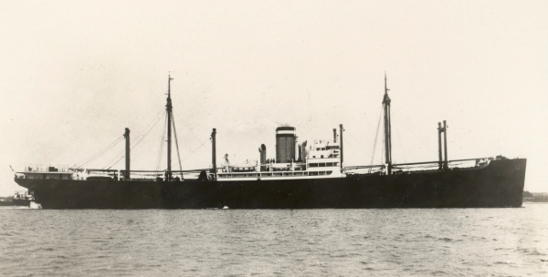 Das Turbinenfrachtschiff BITTERFELD der Hapag